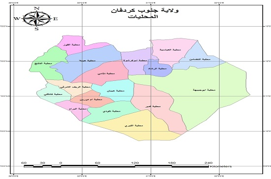 خريطة ولاية جنوب كردفان